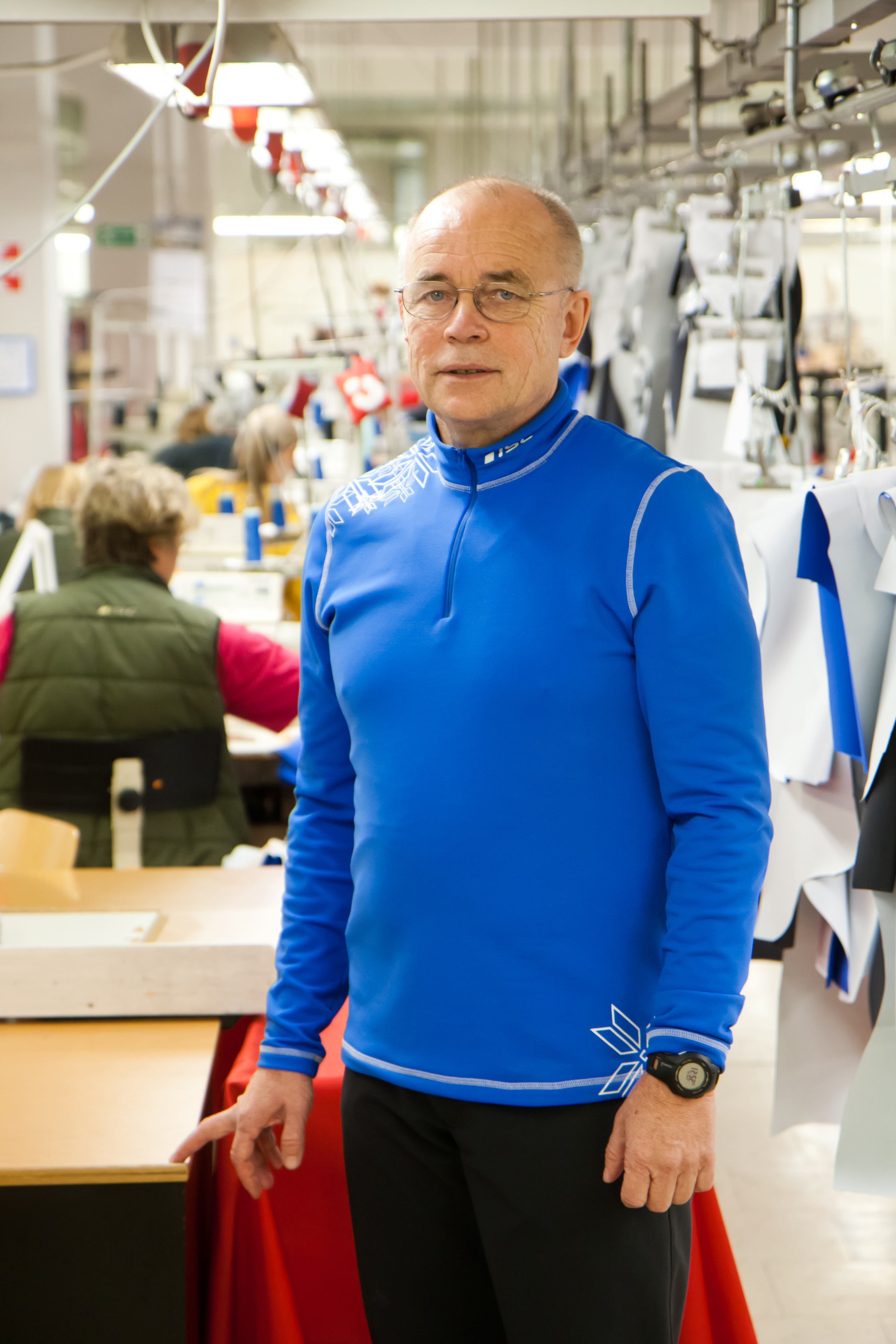 Firmajuht Arvo Kivikas 2013. aastal Tartus, Ilves Extra õmblustsehhis.